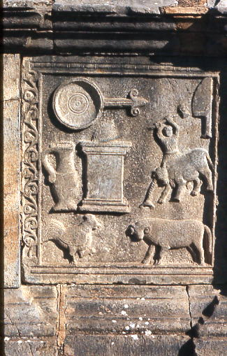 Ruines romaines de Djemila, Algerie